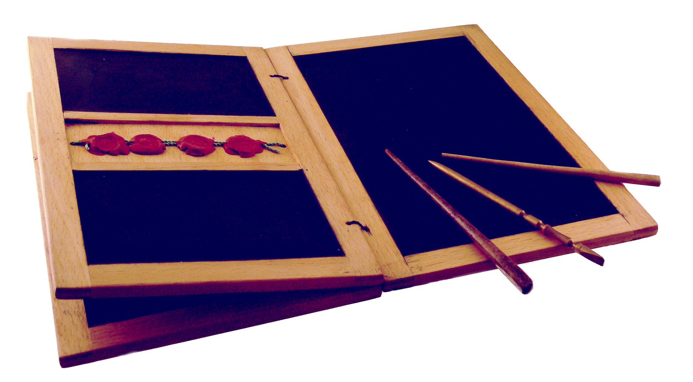 Nachbildung einer römischen Wachstafel mit drei Griffeln (reproduction of an ancient Roman wax tablet with three styli) Gallery: Reiss-Engelhorn-Museen, Mannheim